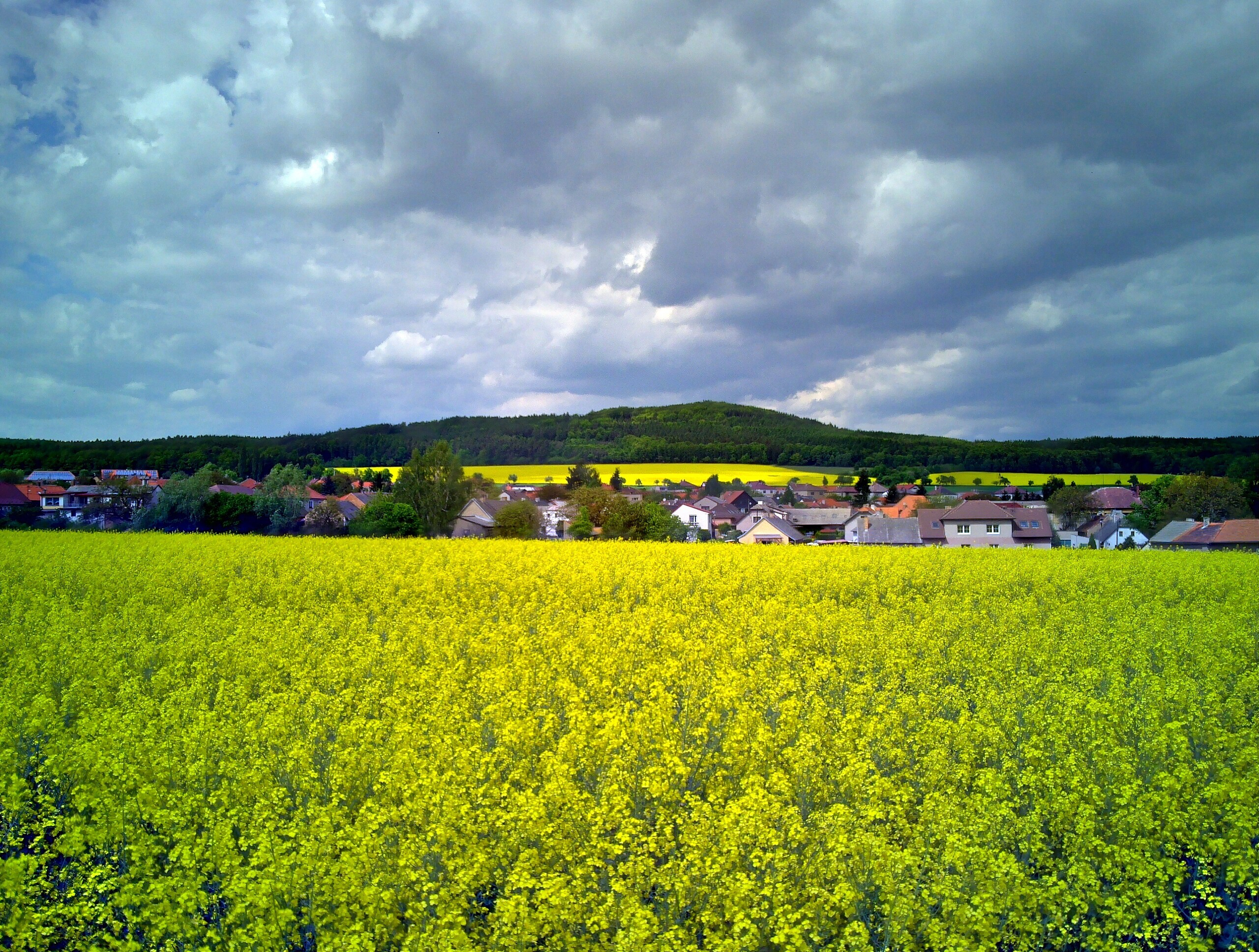 Česky: Obec Drozdov, v pozadí Holý vrch